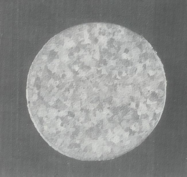 Ungefeinter Versuchskörper aus AlMg-Legierung